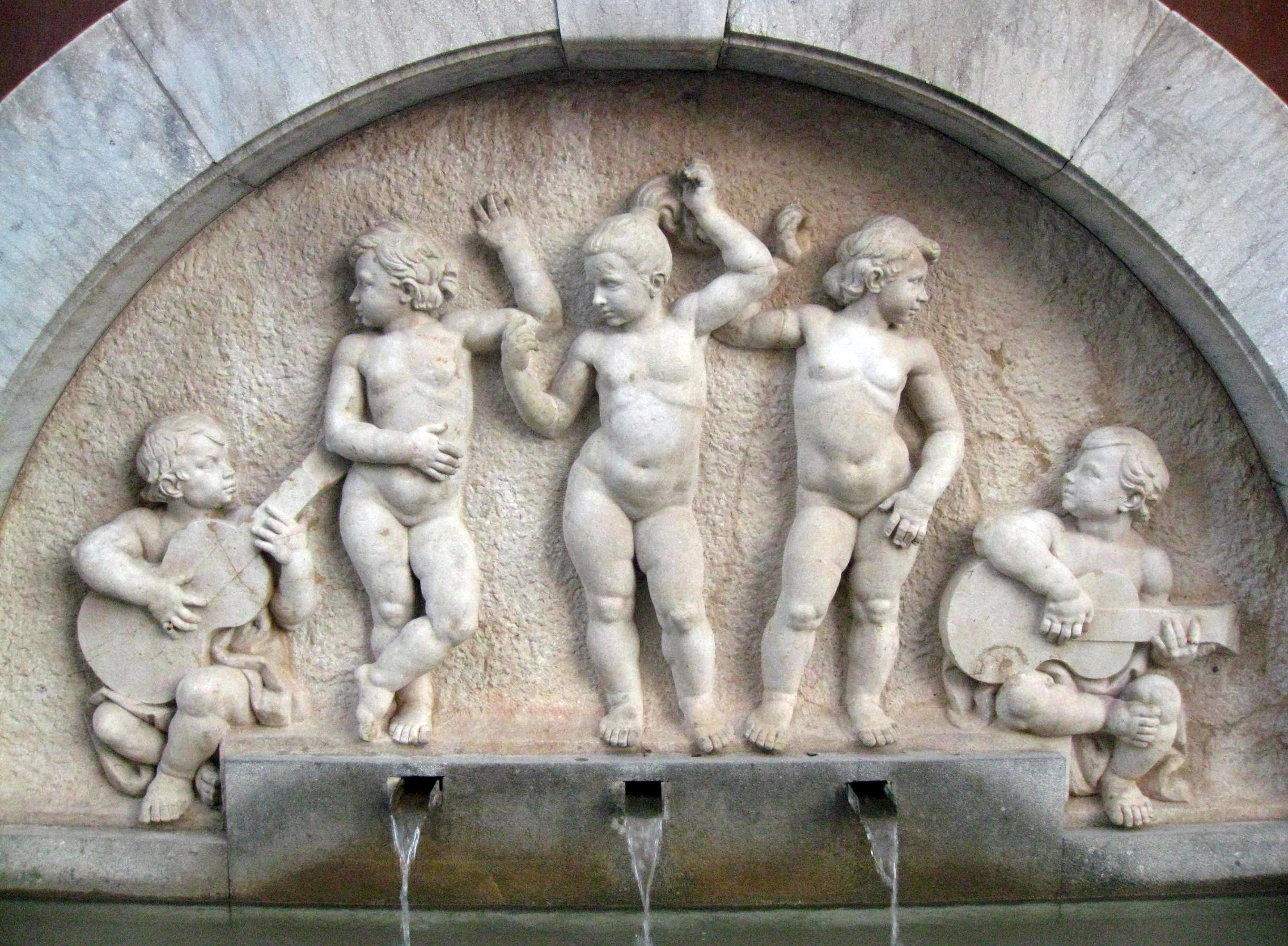 Font Carmen Amaya (Rafael Solanich). Pl. Brugada (Barcelona)